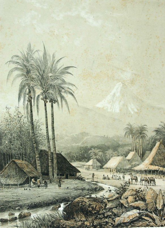 Litho. Litho naar een oorspronkelijke aquarel van Rappard. Dorpsgezicht met de vulkaan Smeroe op de achtergrond